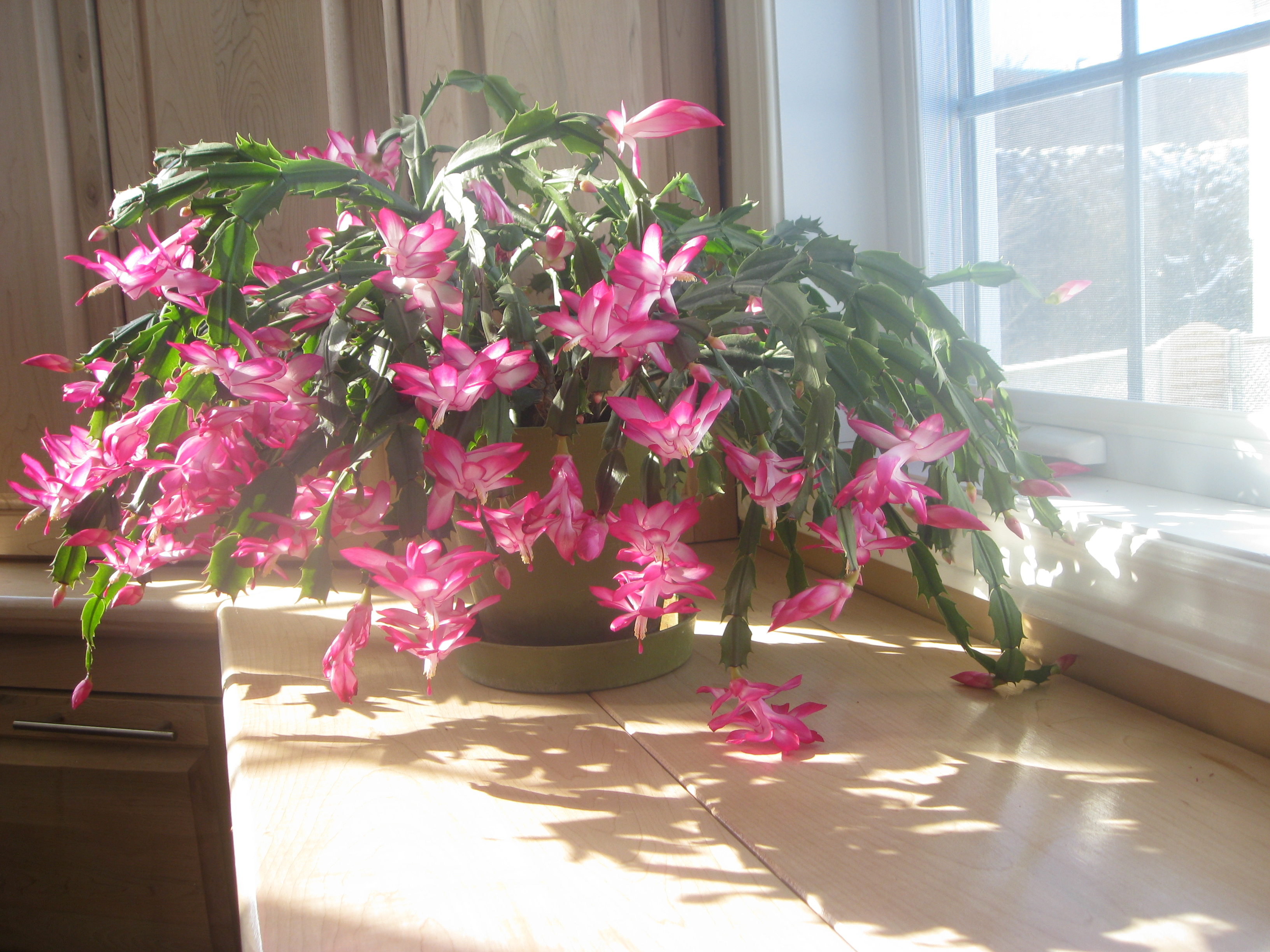 Photo d'un cactus de noël en pleine floraison.